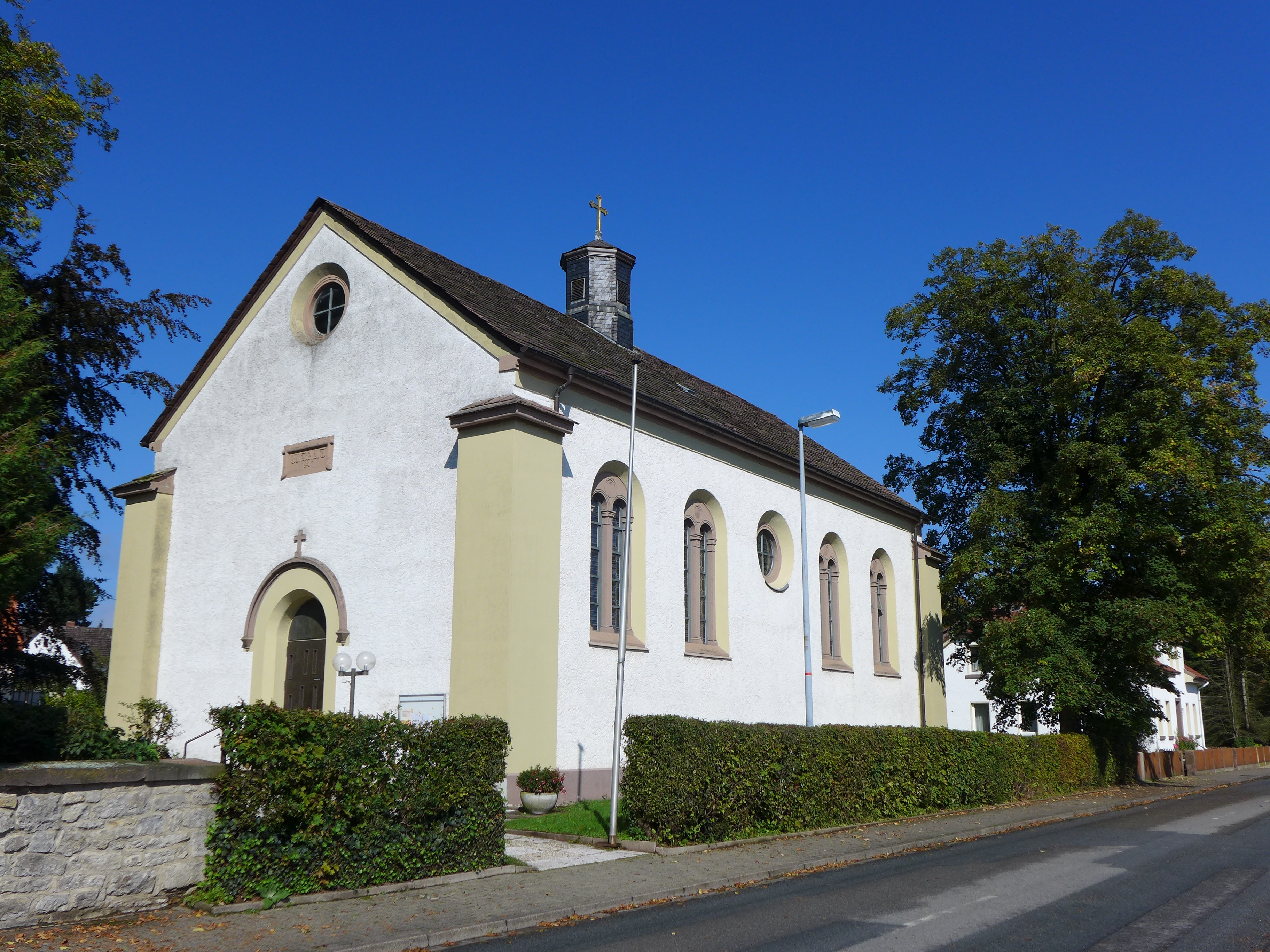 St. Michael Dassel